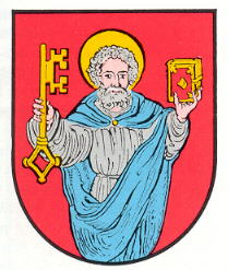 Das Wappen von Edesheim/Pfalz